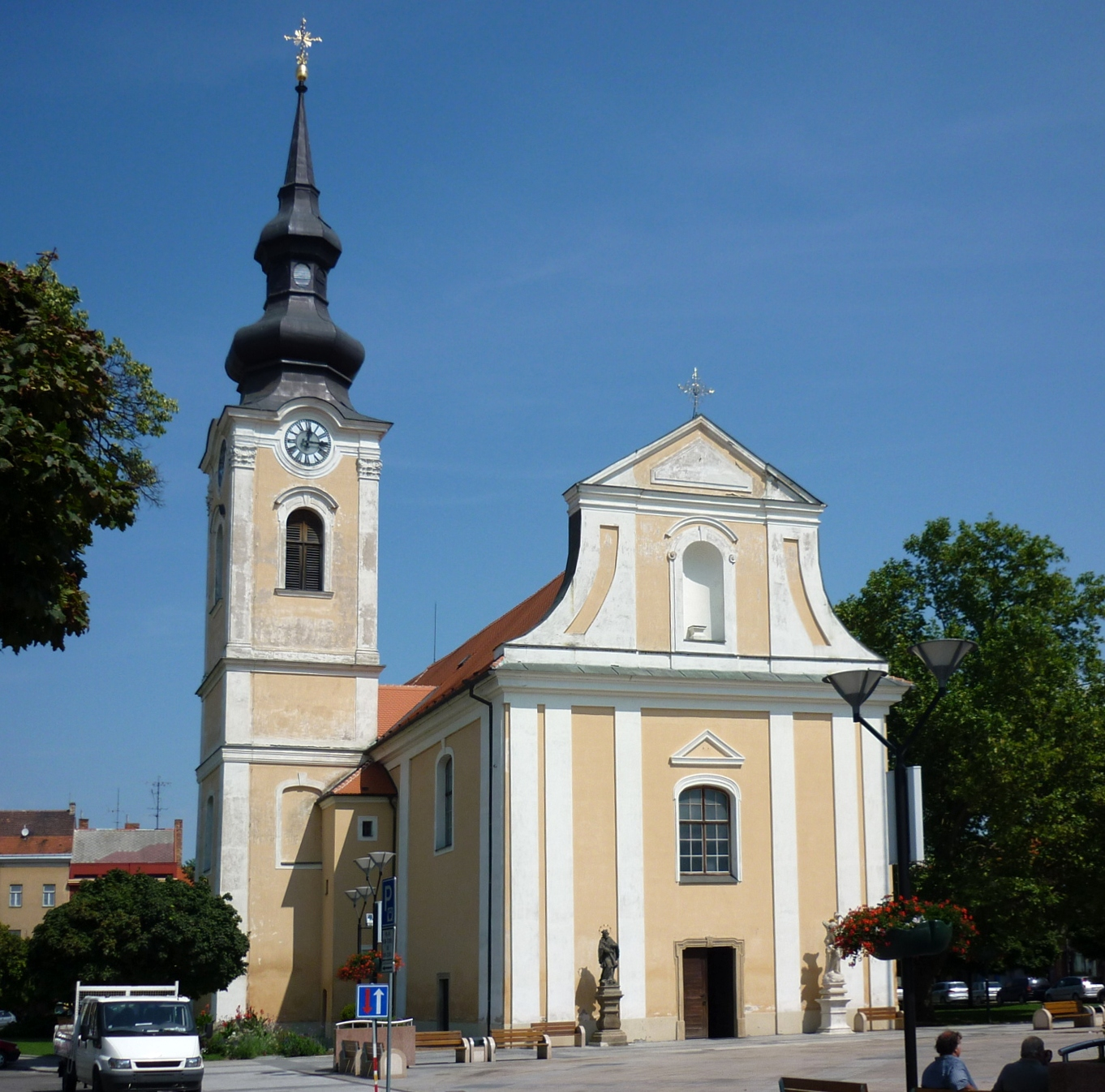 Hodonín, kostel sv. Vavřince